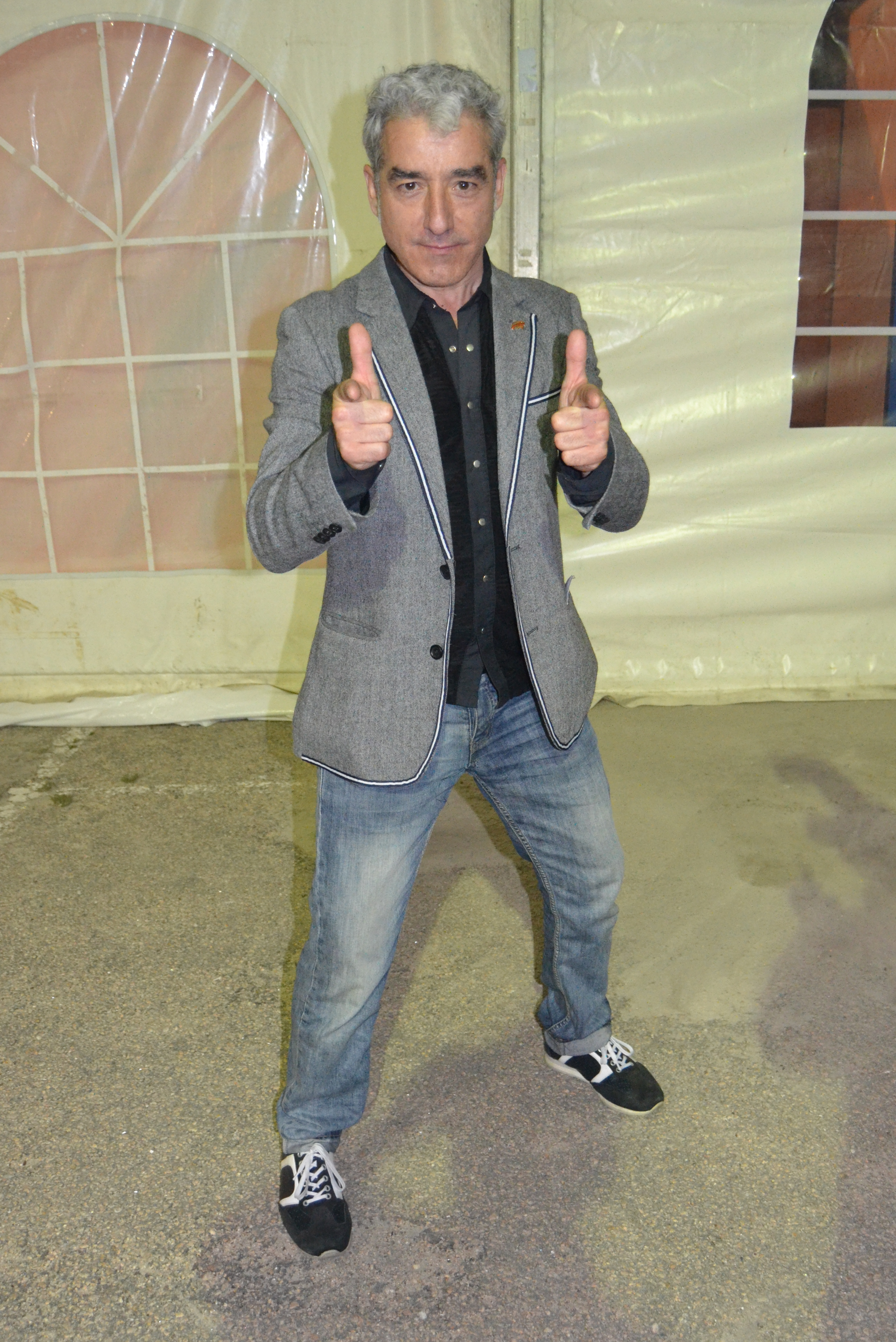 Sergio Pazos na festa da langosta 2014 da Guarda